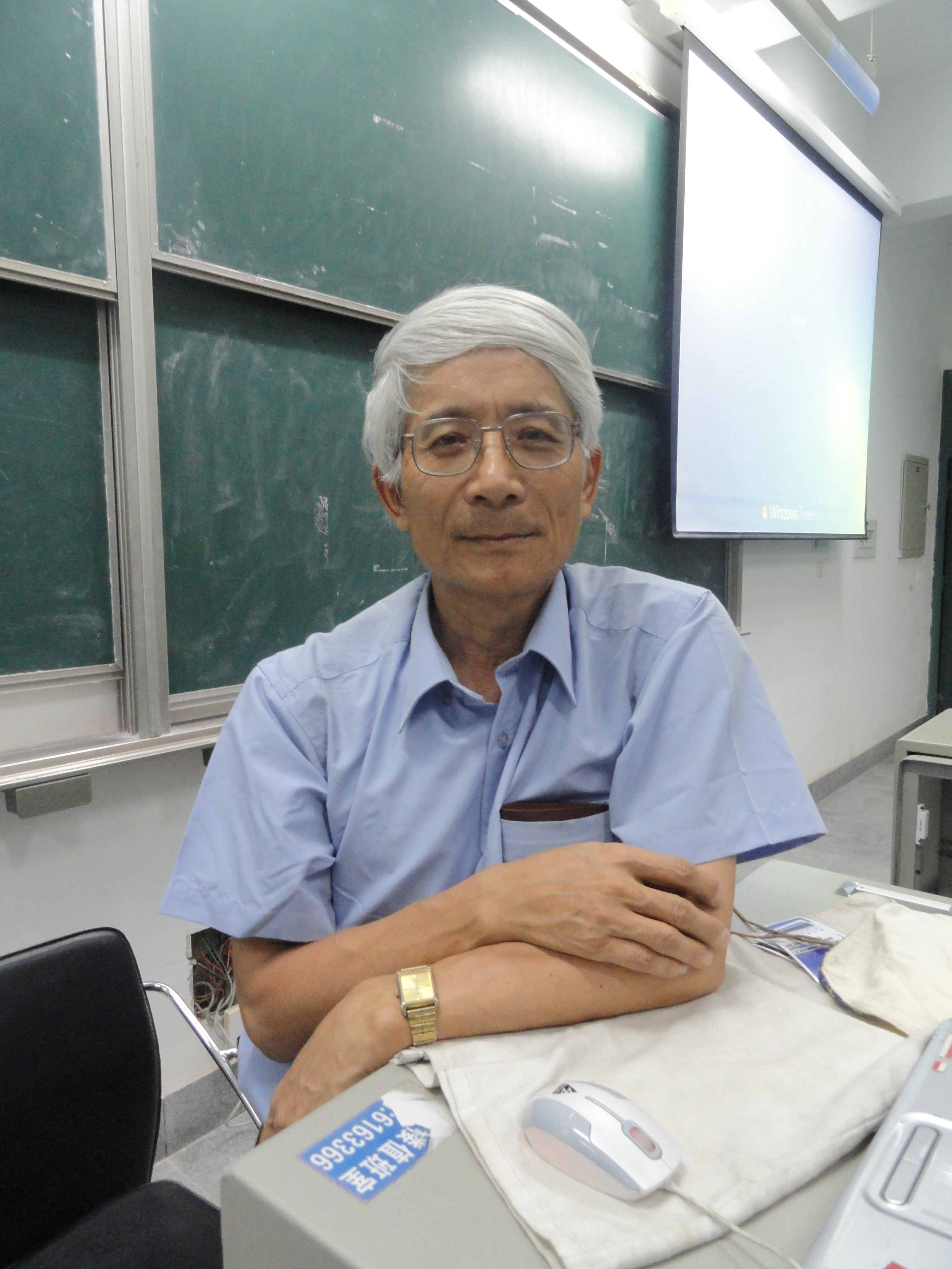 台湾知名业余天文学家及天体摄影家杨昌炽